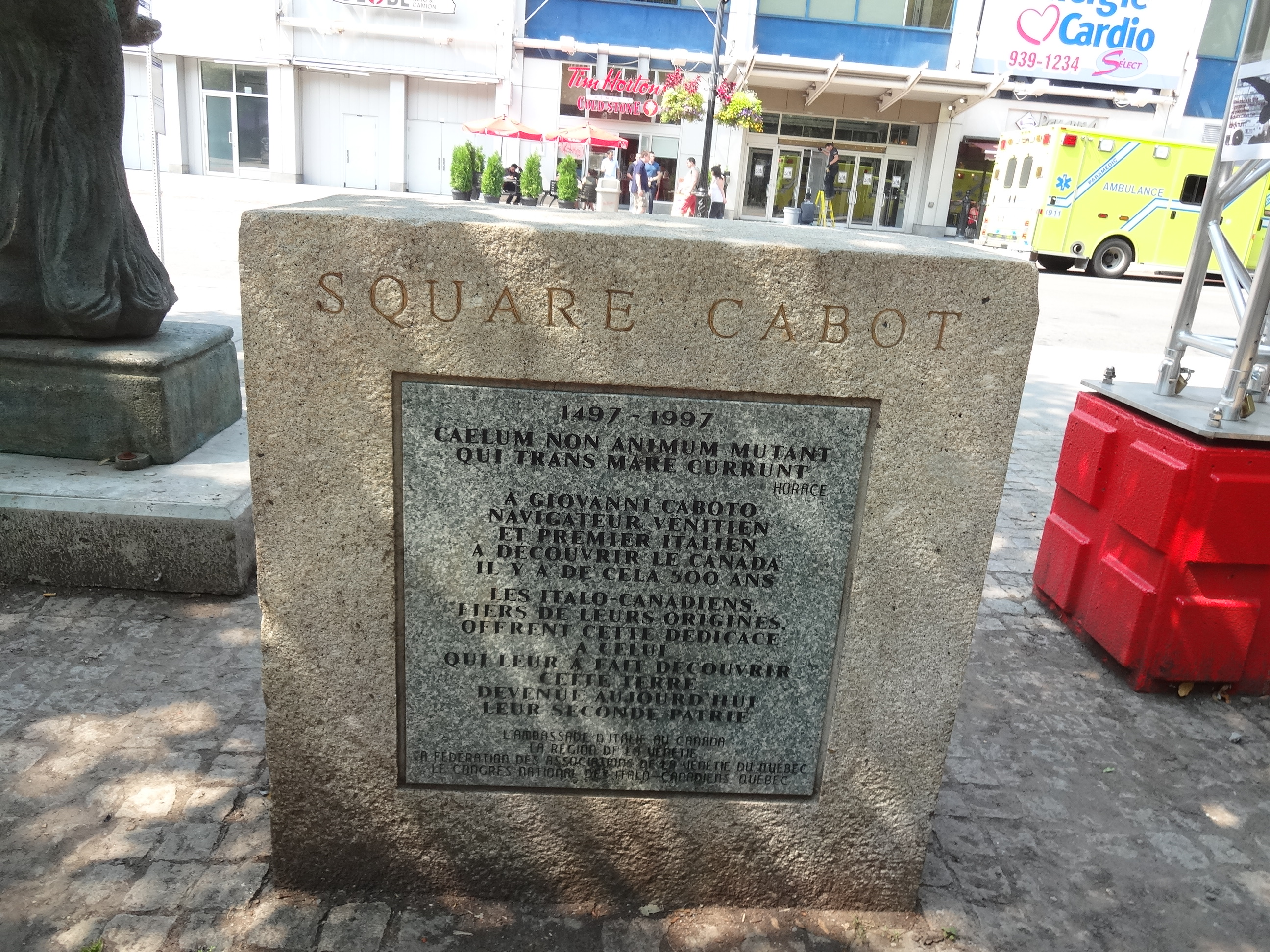 Square Cabot, Montreal.